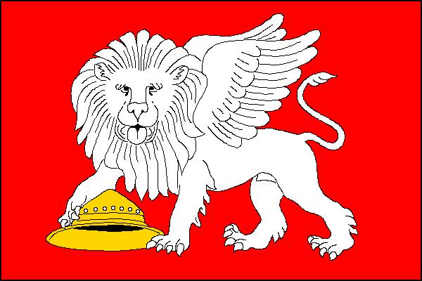 Vlajka obce Třibřichy